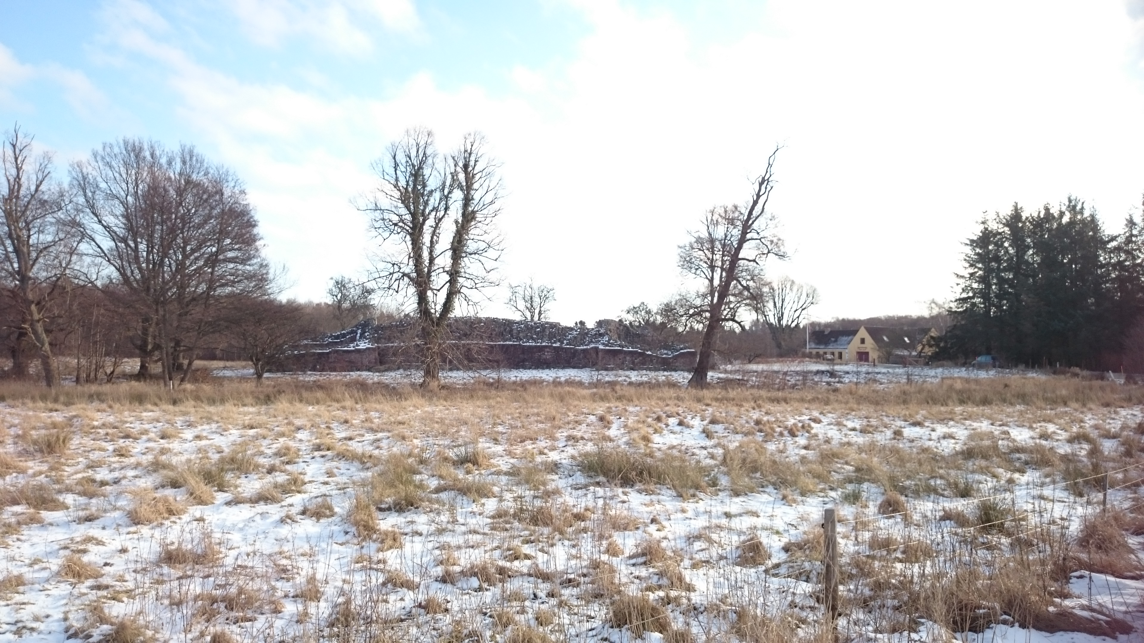 Gurre Slot i januar 2017.